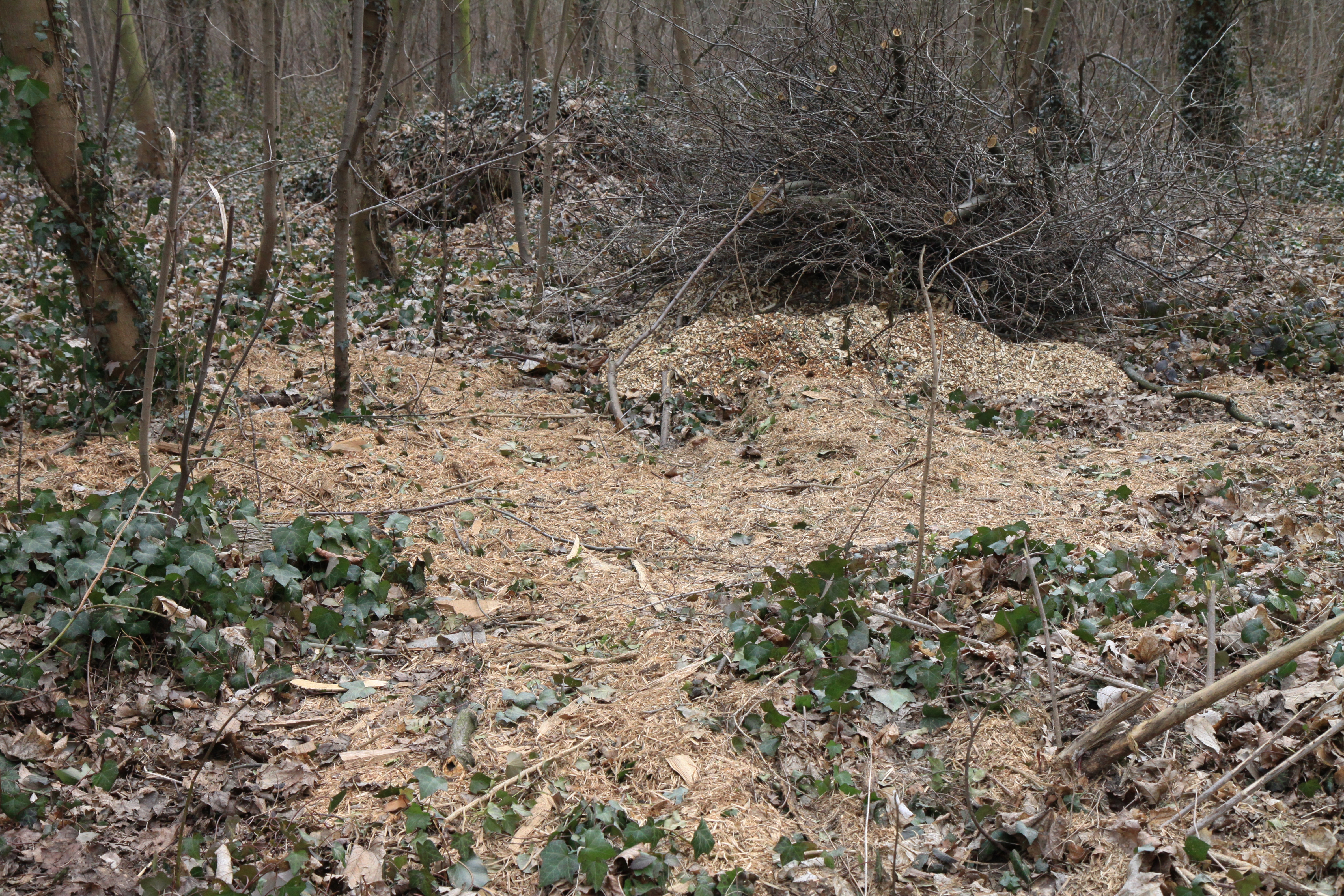 Compost de broussailles dans le bois de Vincennes.